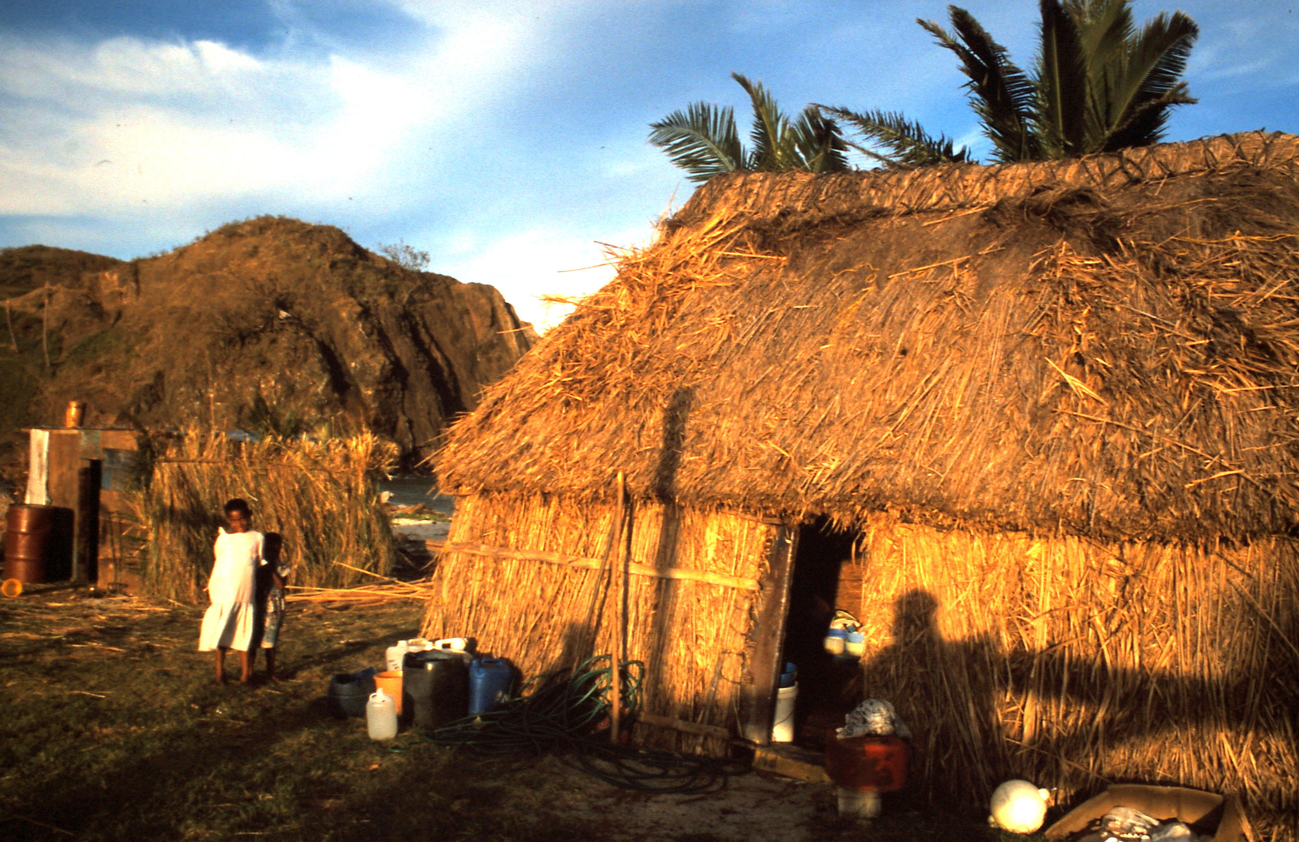 Wohnhaus auf der Insel Matacava Levu, Fiji